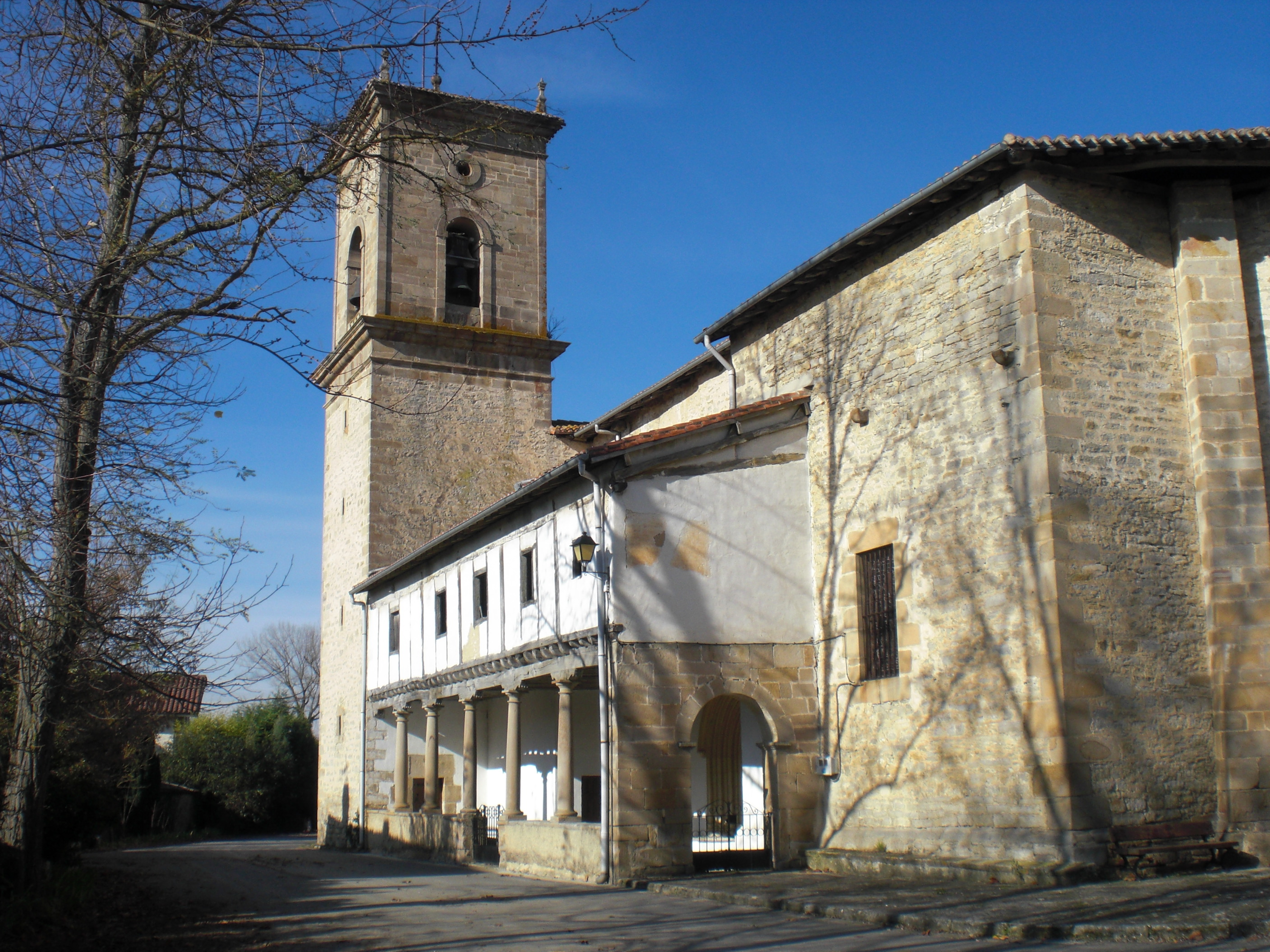 Jungituko elizaren ikuspegia